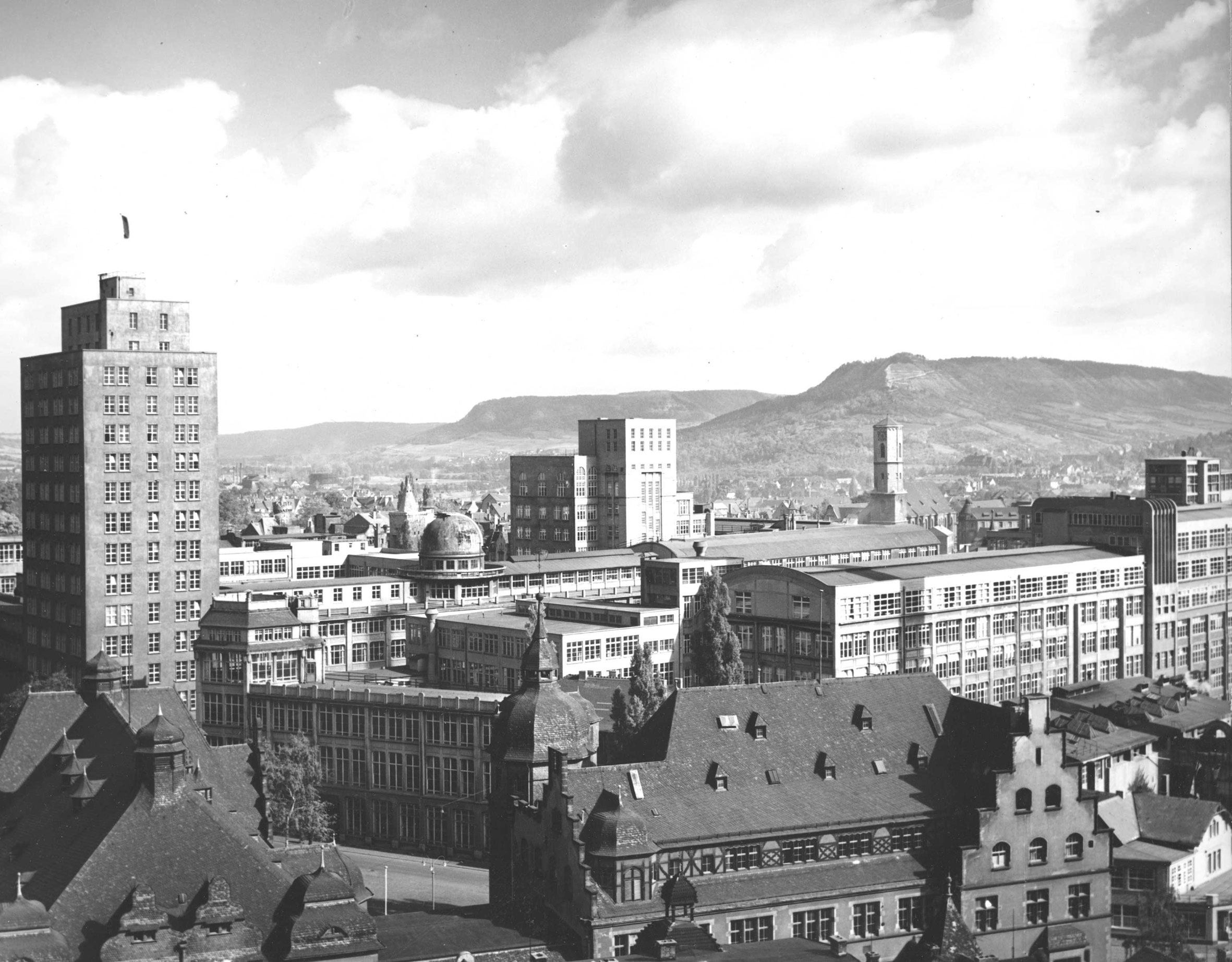 Основното производство на Карл Цайс през 1958 в Йена, Германия